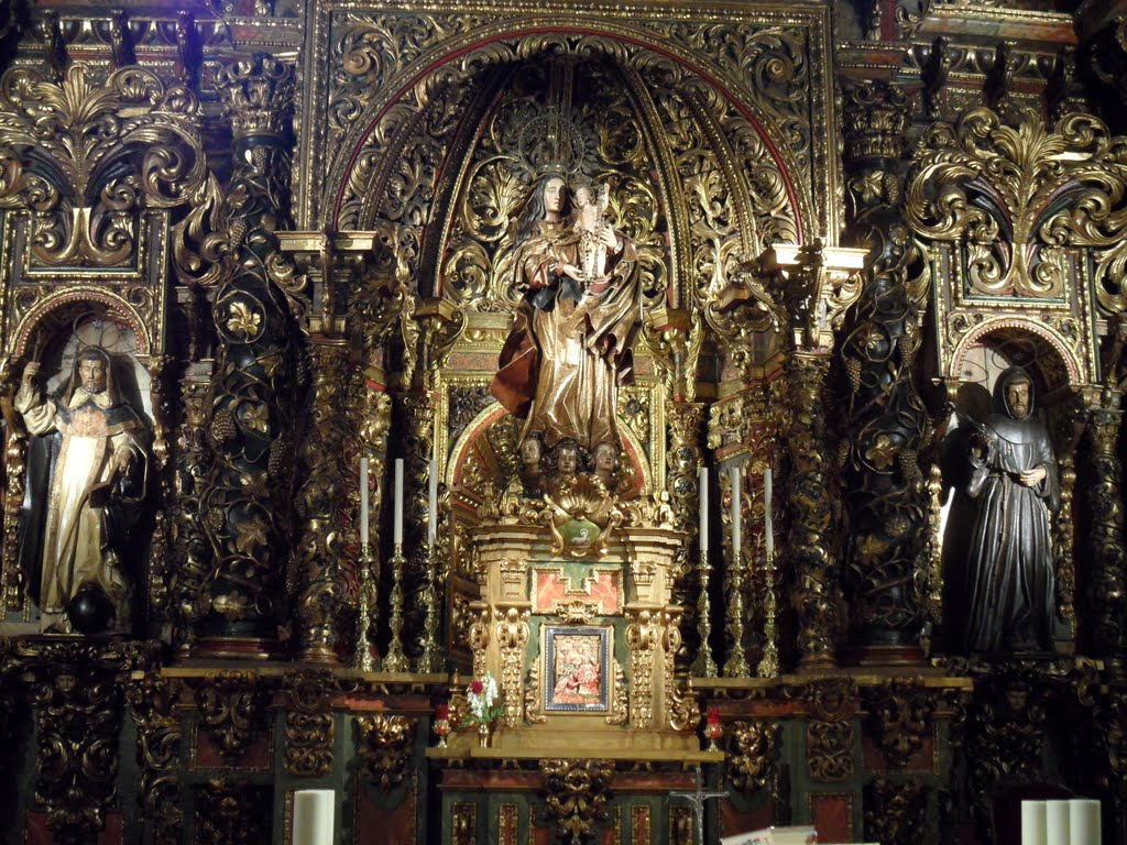 El retablo mayor data de 1710 y predominan las imágenes de Nuestra Señora del Rosario, Santo Domingo y San Francisco de Asís. El Sagrario con el Nacimiento de Jesús y el ambón neobarroco del año son de finales del siglo XX.